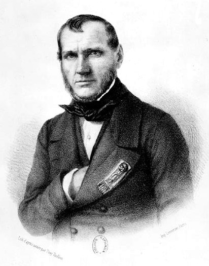 Corcelle en buste